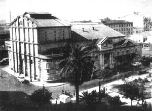 O antigo Teatro Colombo em São Paulo, Brasil.